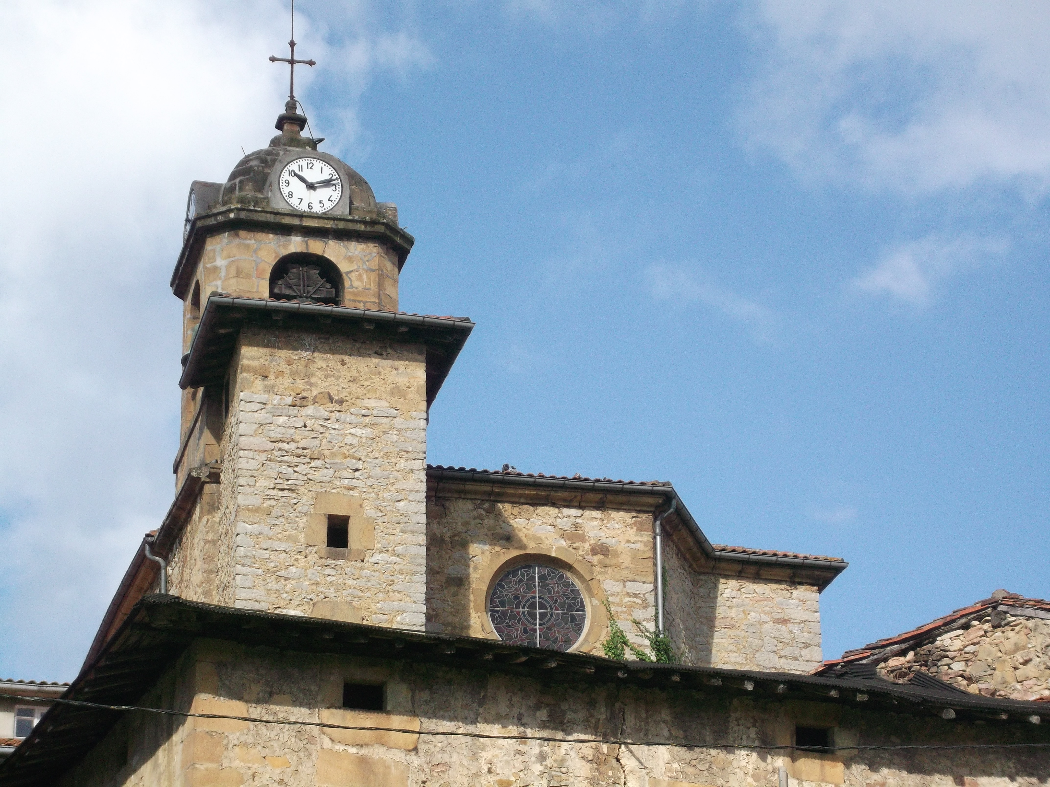 Iglesia de San AndresEuskara: San Andres eliza